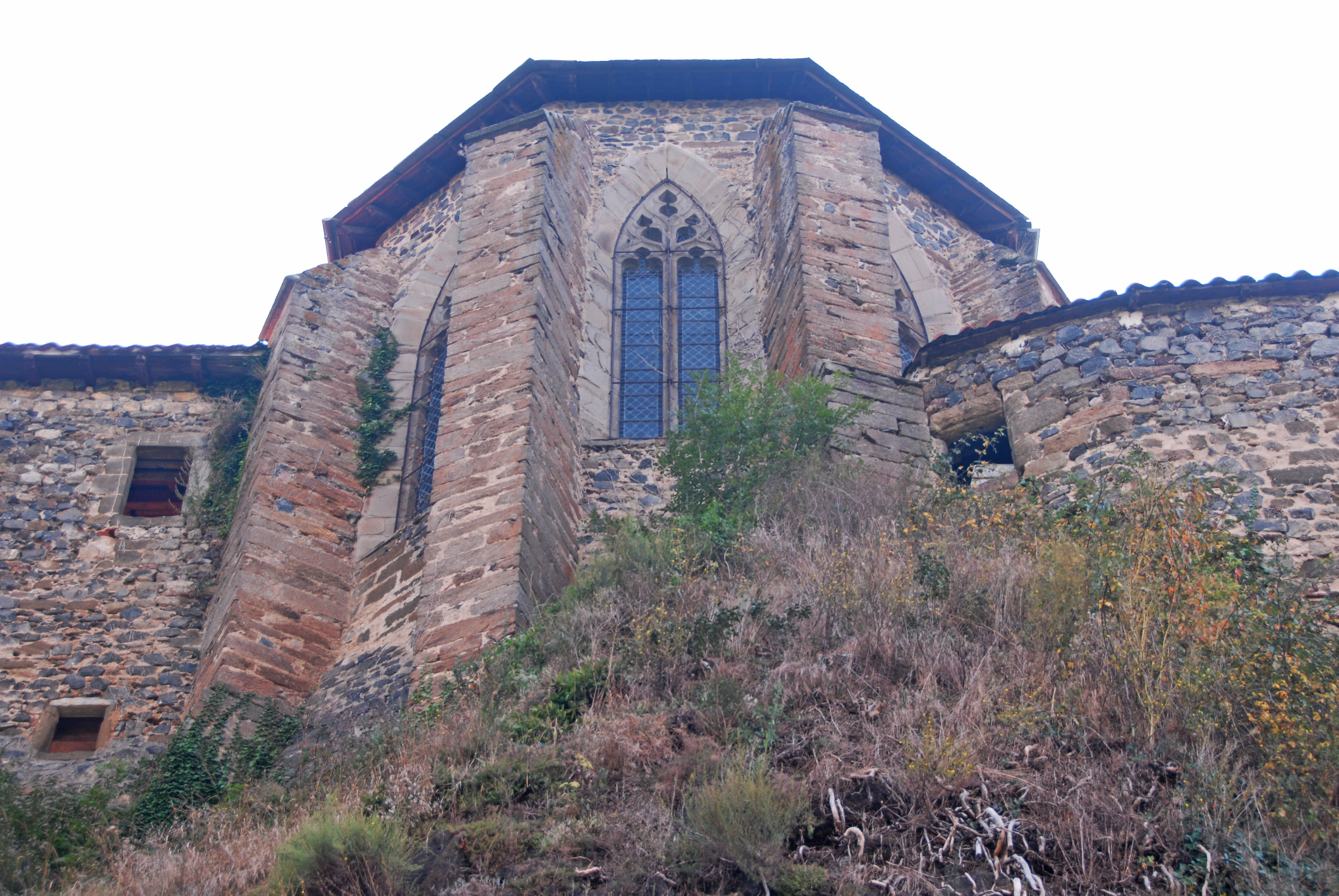 Chanteuges, Chor Chapelle Ste.-Anne